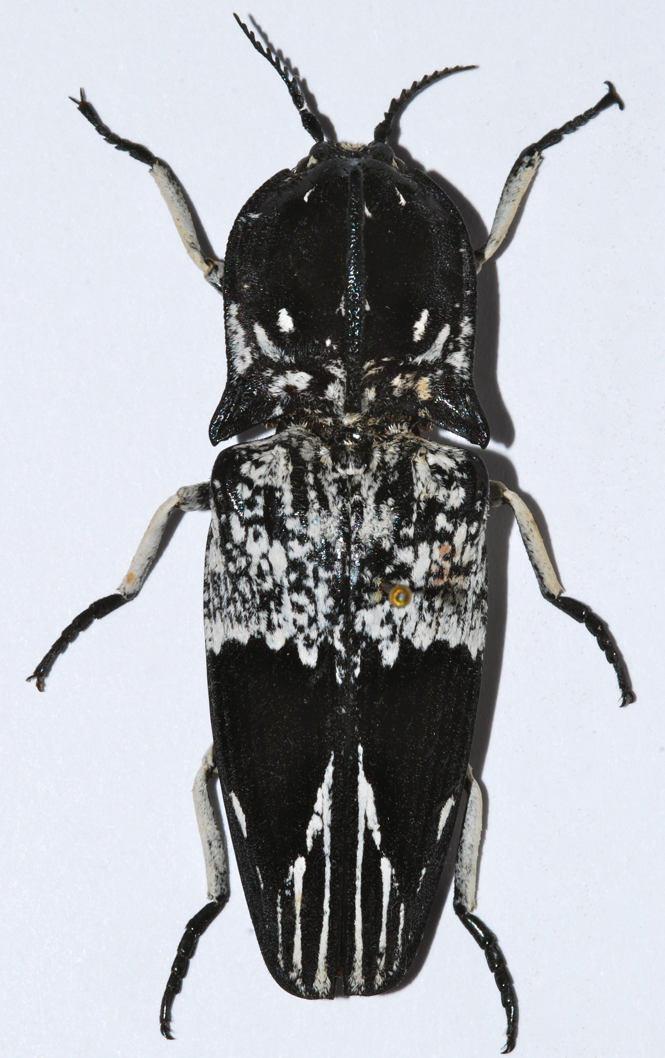 Beparasy, MADAGASCAR